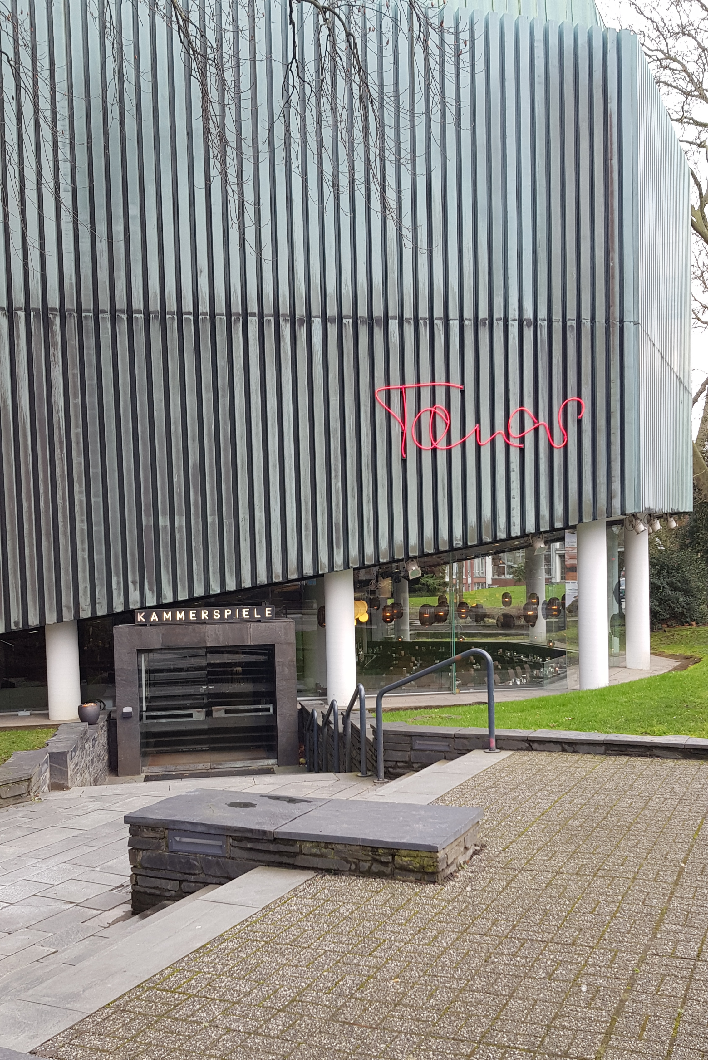 Kammerspiele Bochum Außenansicht Eingang Foyer mit Schriftzug Tanas